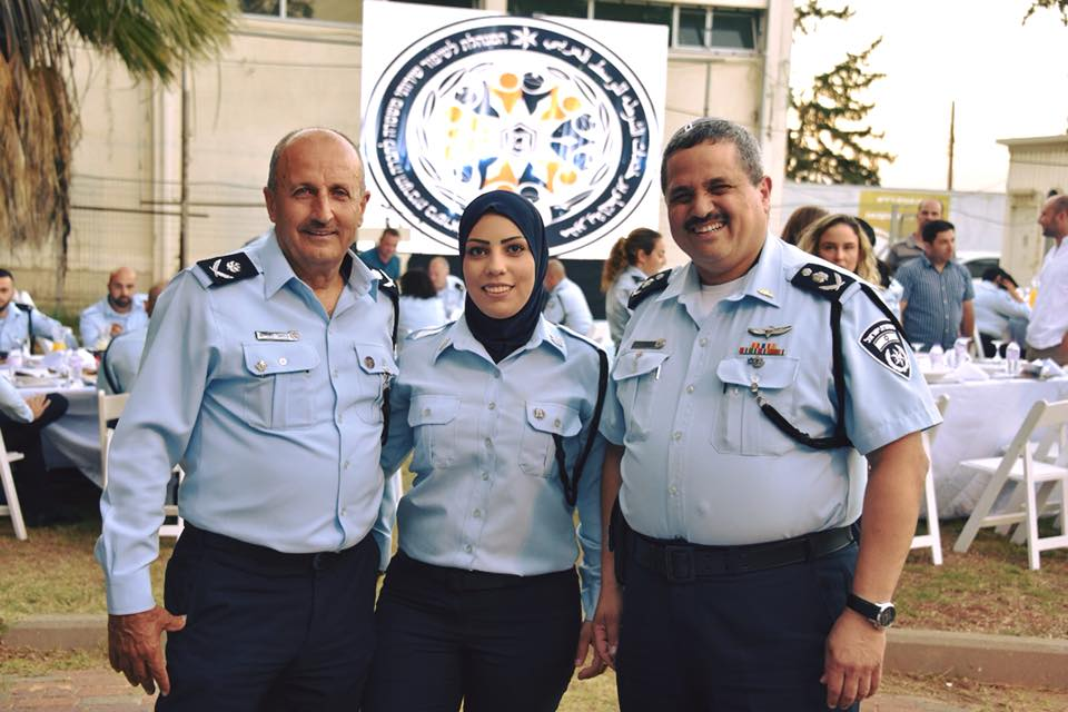 רוני אלשיך וג'מאל חכרוש בתקופת הרמדאן.